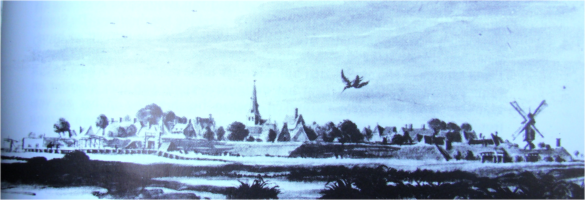 Panorama view of Bredevoort 1743 by Jan de Beijer